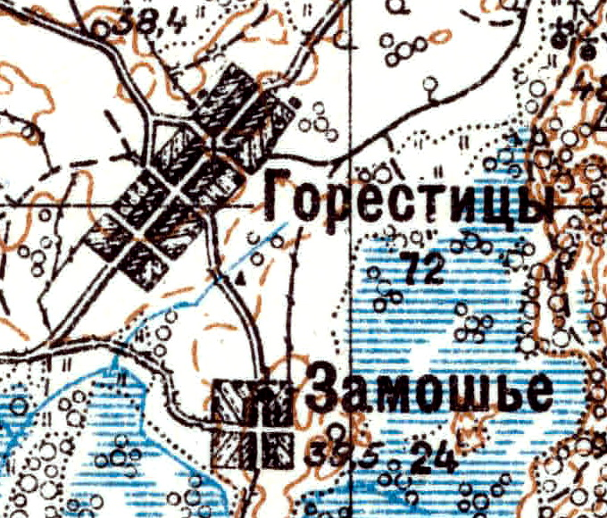 Топографическая карта Ленинградской области, квадрат VIc-26 (Ставотино), деревни Горестницы и Замошье